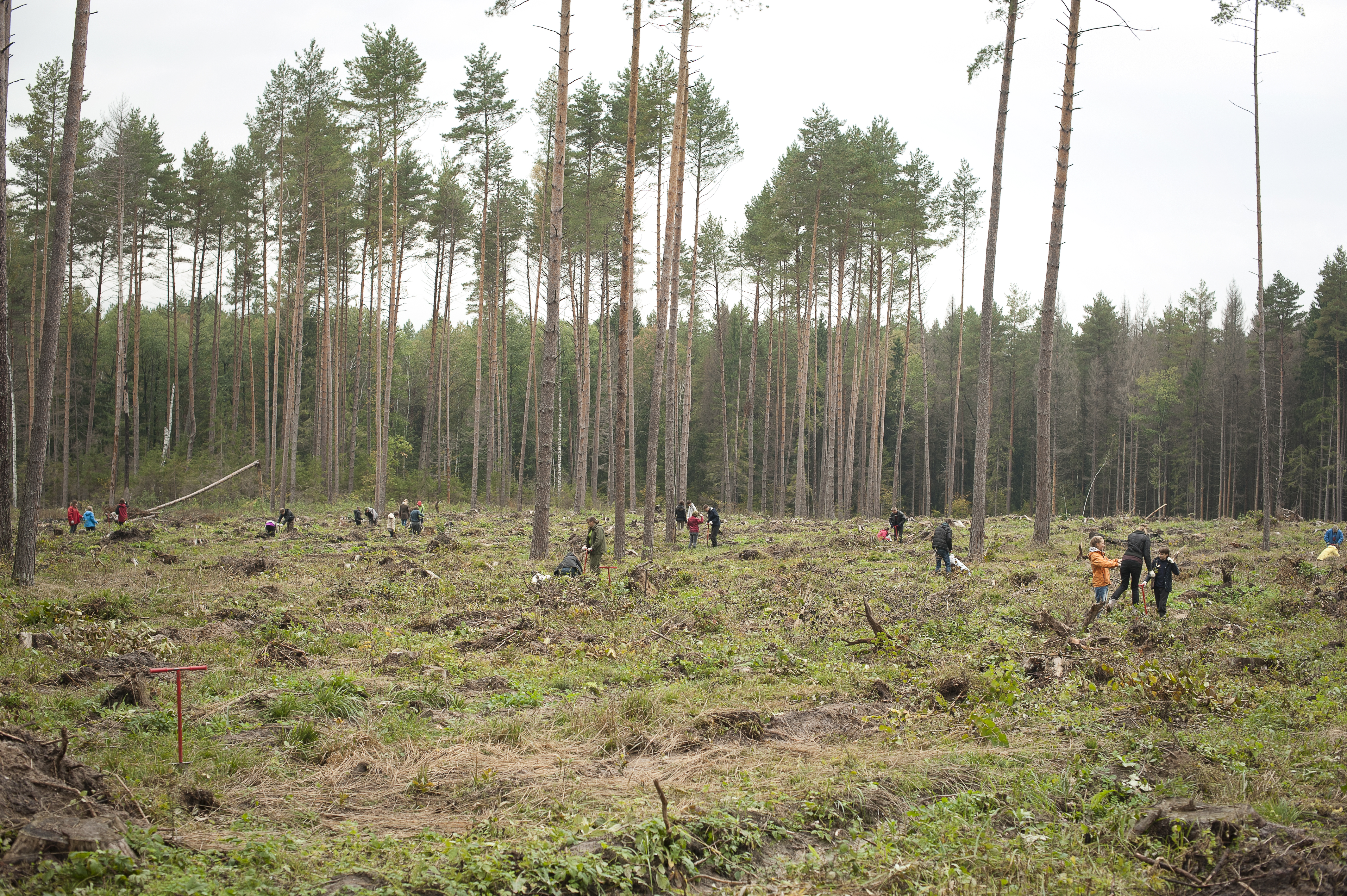 Обезлесенный участок пострадавший от короеда, Нациоанльный парк Угра